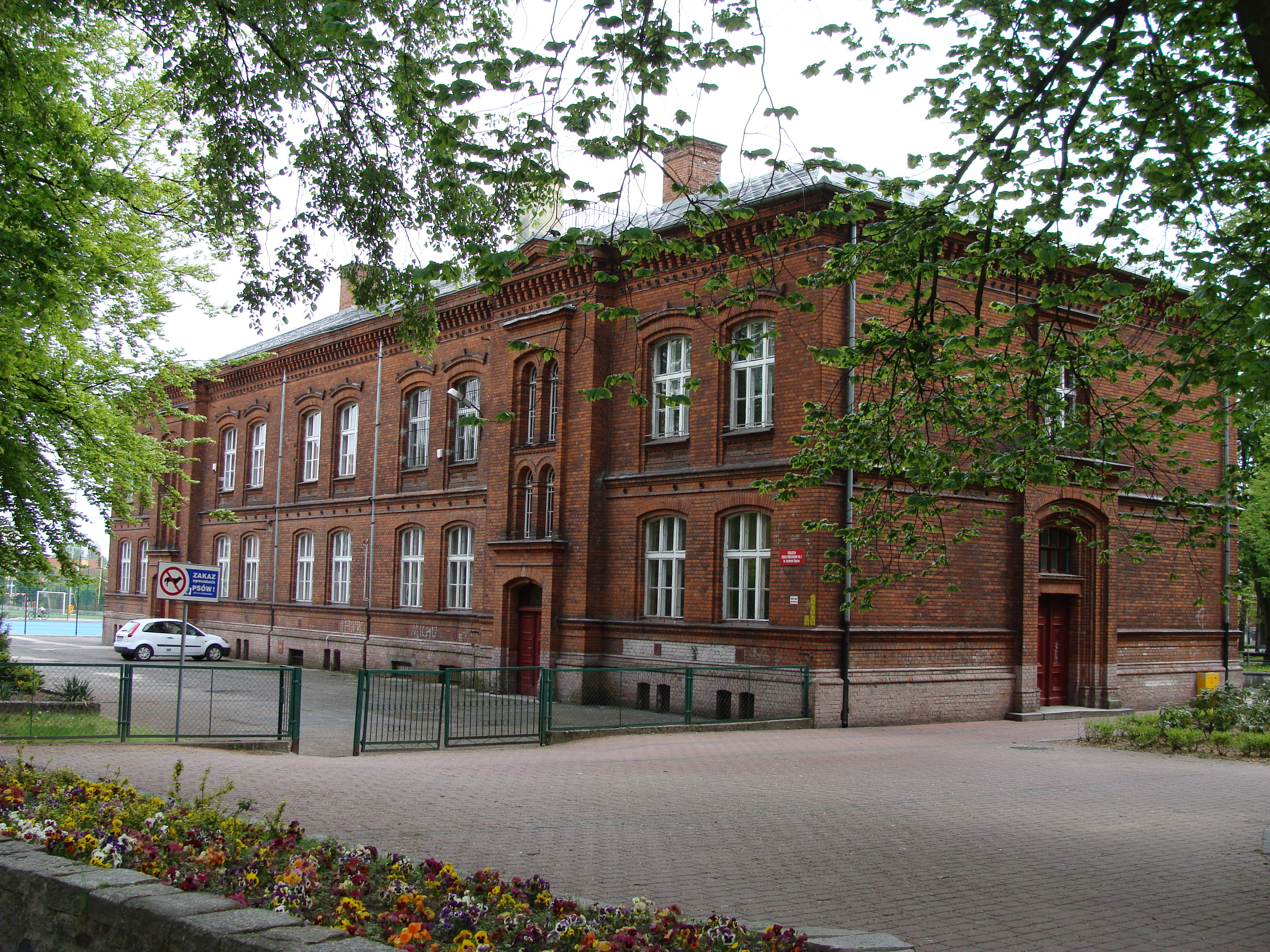 Świebodzin, Park Chopina 1 - progimnazjum (elewacja północna), ob. szkoła podstawowa, 1876